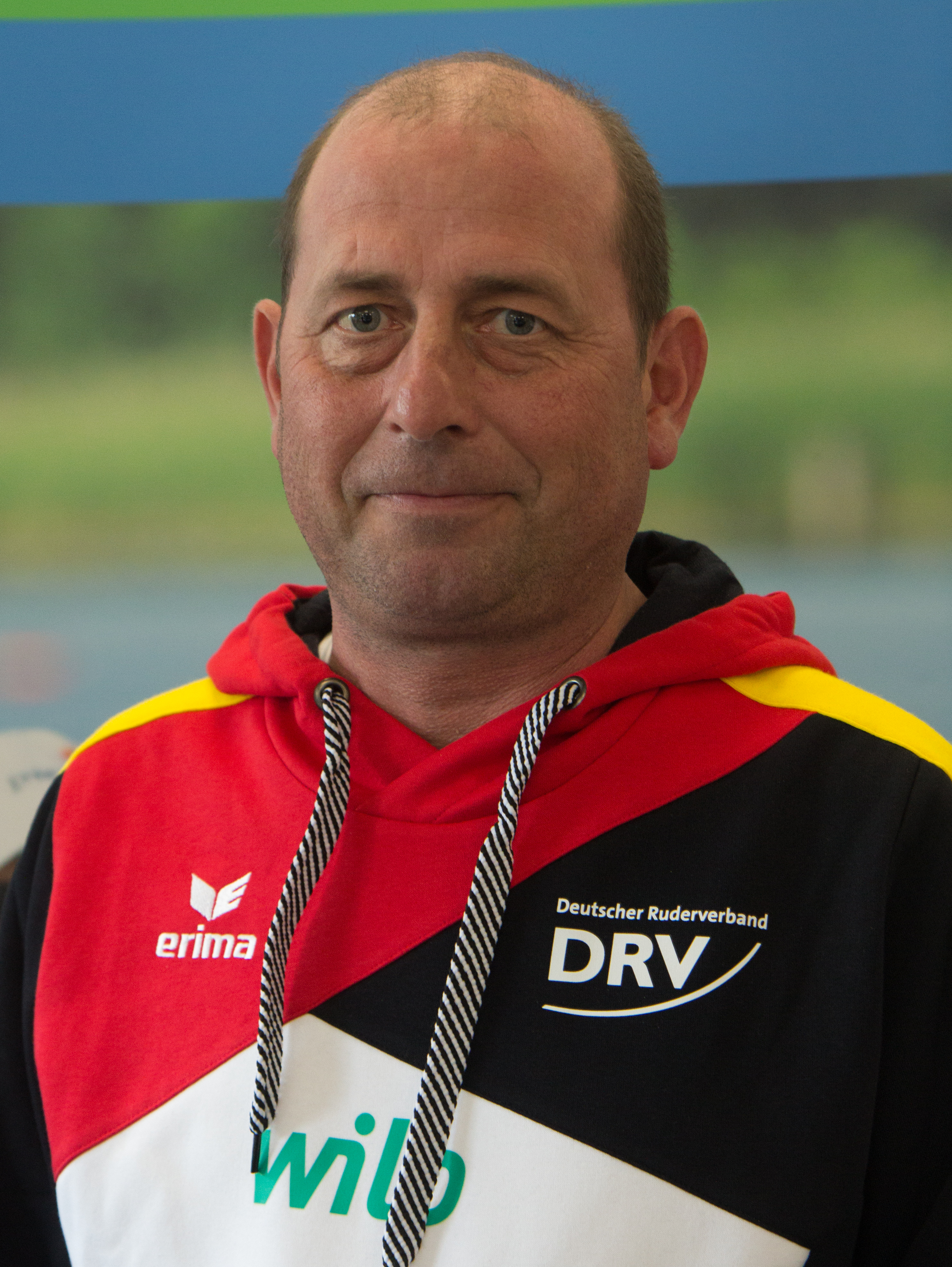 Peter Thiede beim Medientag des Deutschen Ruderverbandes am 6. September 2017 in der Ruderakademie in Ratzeburg.